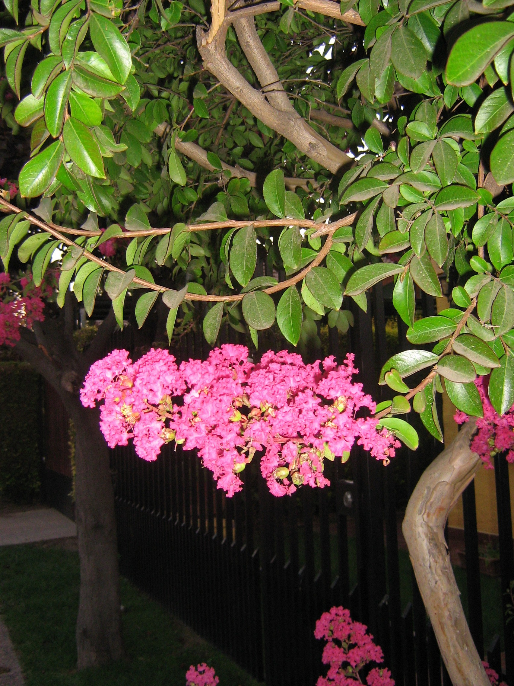 Lagerstroemia indica ex hortus